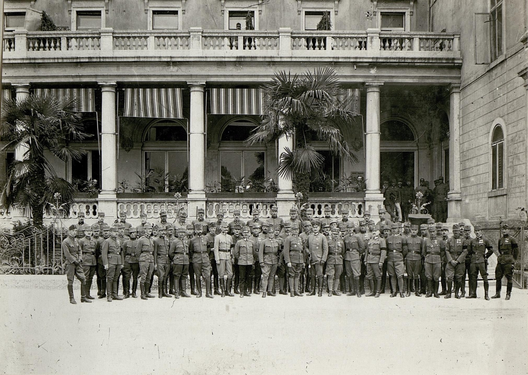 Deutsche Offiziere beim 11. Armeekommando in Trient